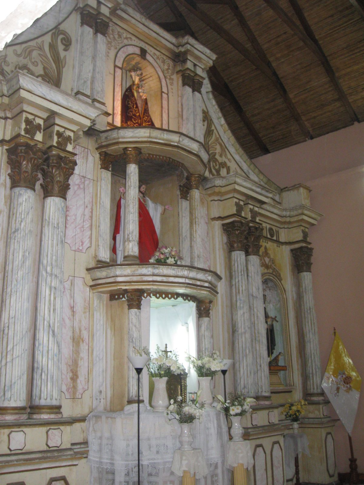 retabloiglesiasanjosepacasmayo